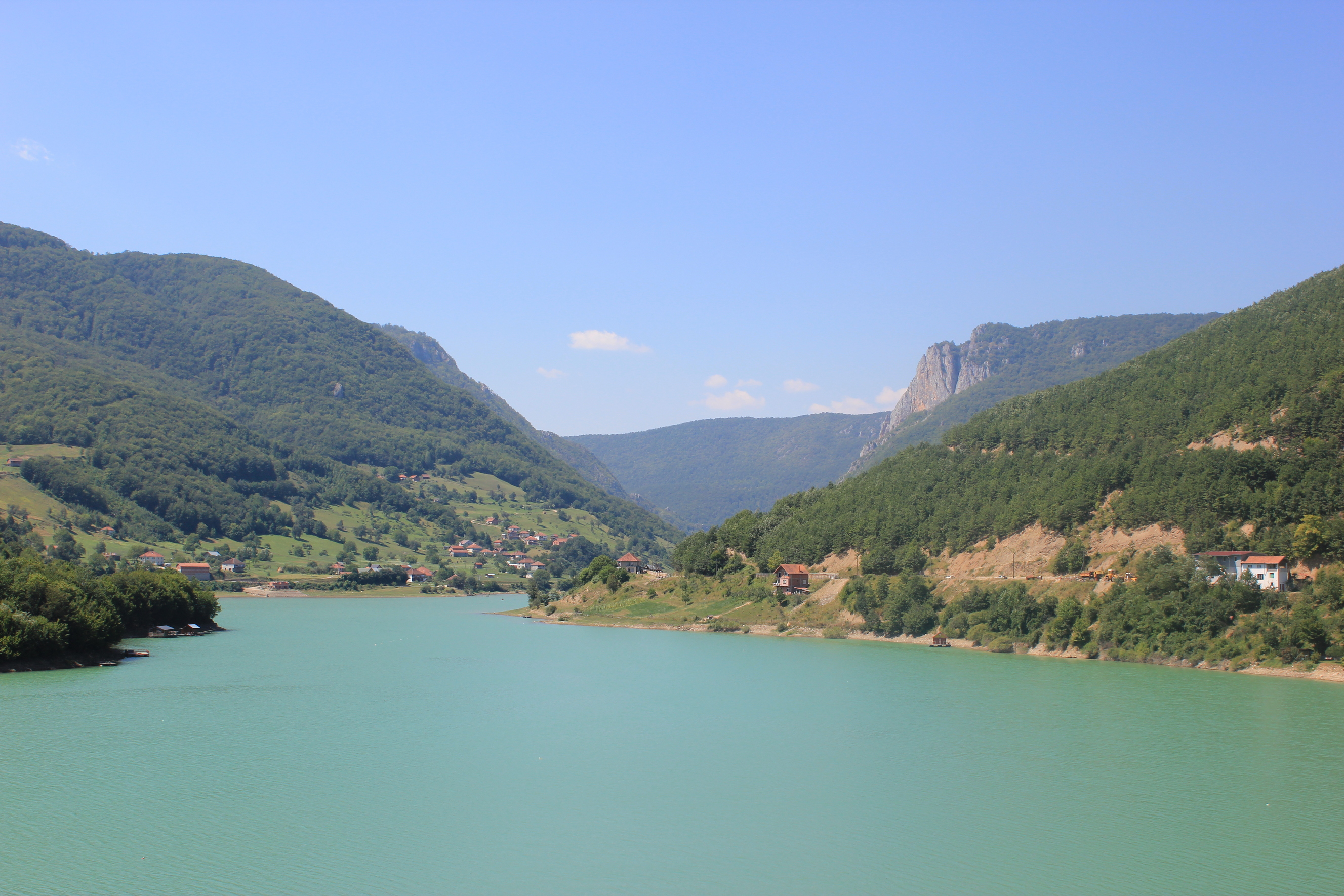 Der Gazivode-See im Nordwesten des Kosovo.Hornjoserbsce: Gazivodski spjaty jězor w sewjerozapadźe Kosowa.